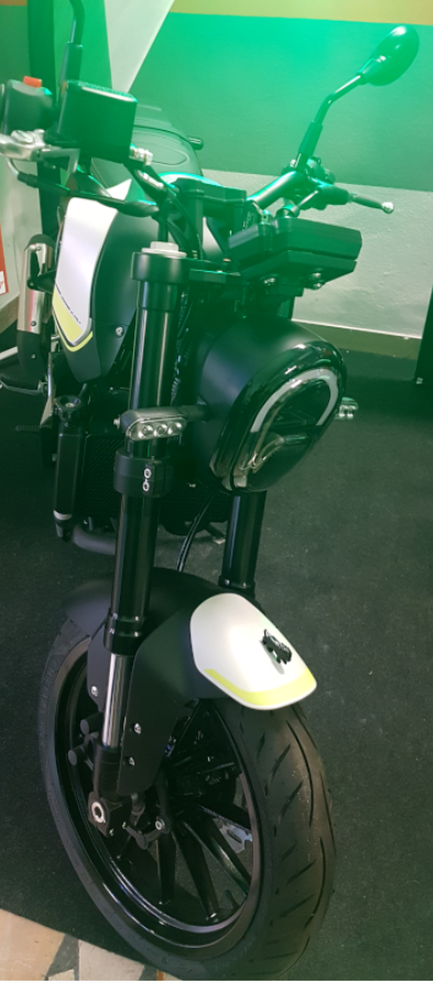 Benelli Leoncino 250, modello del 2019